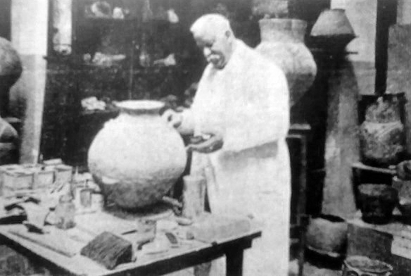 Emilio Roger Wagner, ideólogo de la tesis de la "Civilización Chaco-Santiagueña".